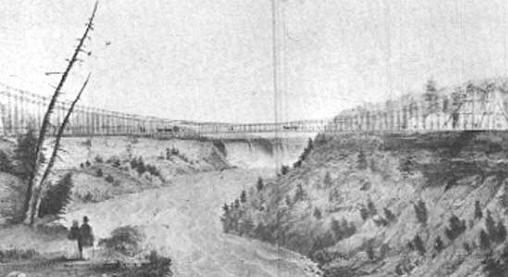 collection Niagara Falls Heritage Foundation